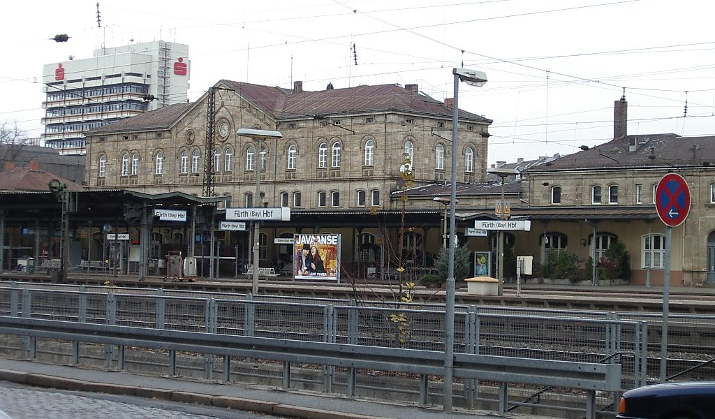 Fürth, Bayern, Deutschland. Hauptbahnhof von Südosten am 2. November 2003. Empfangsgebäude von Eduard Rüber, 1863/1864 im Rundbogenstil errichtet. Im Hintergrund das moderne Hochhaus der Sparkasse.